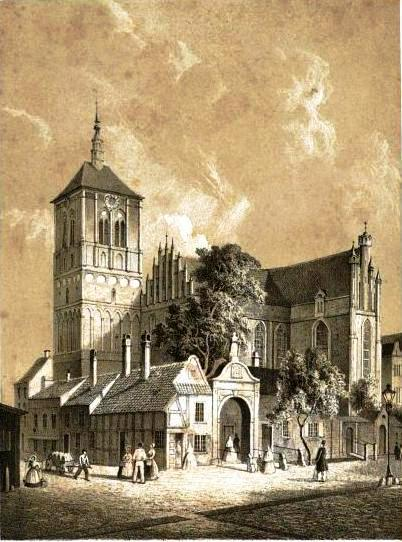 Gdańsk Główne Miasto, ul. Świętojańska 50 - rzymskokatolicki kościół rektorski, pw. św. Jana Chrzciciela i Jana Ewangelisty, poł. XIV, 1415-1465, 1969